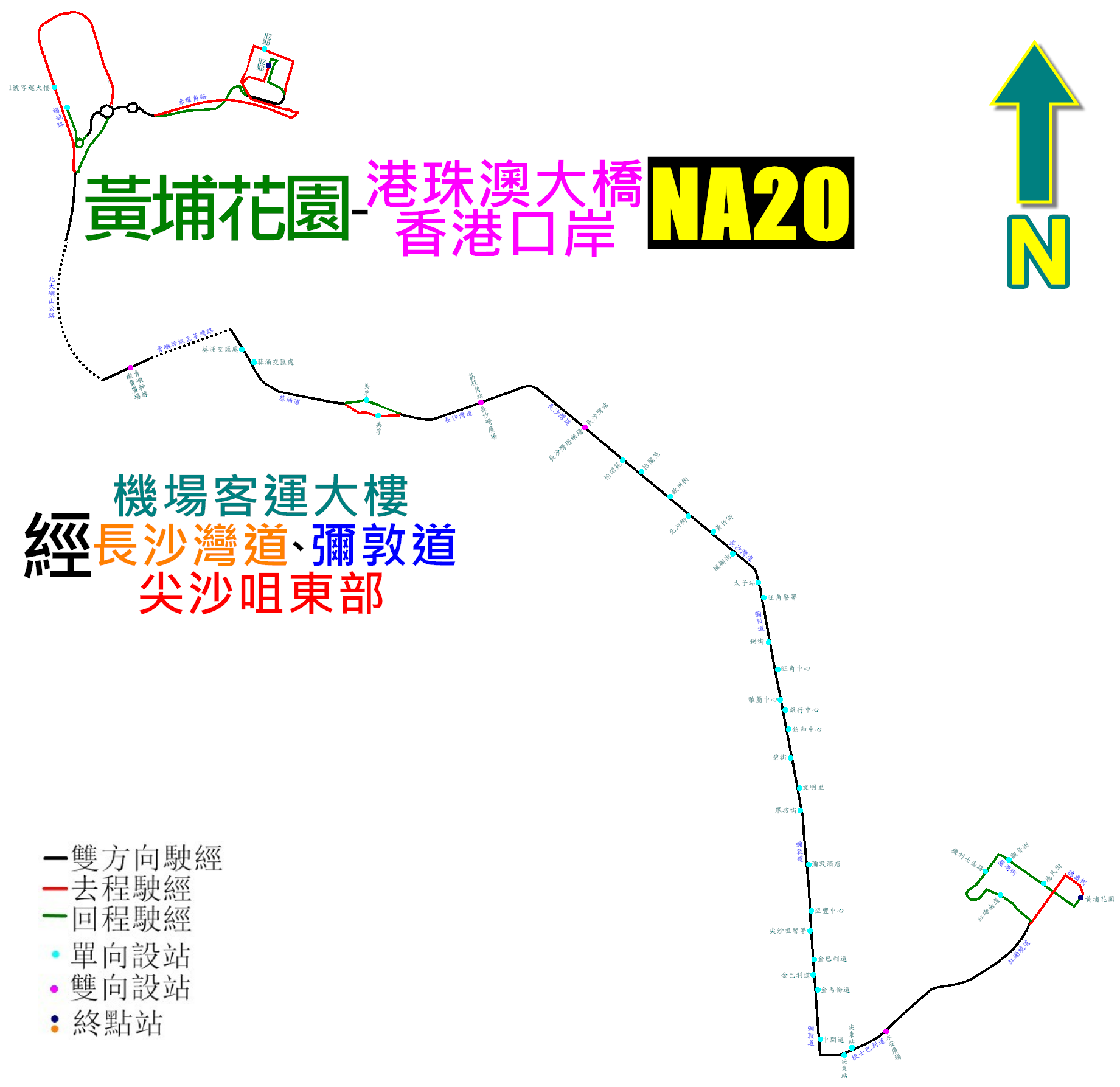 城巴機場快線NA20線的走線圖